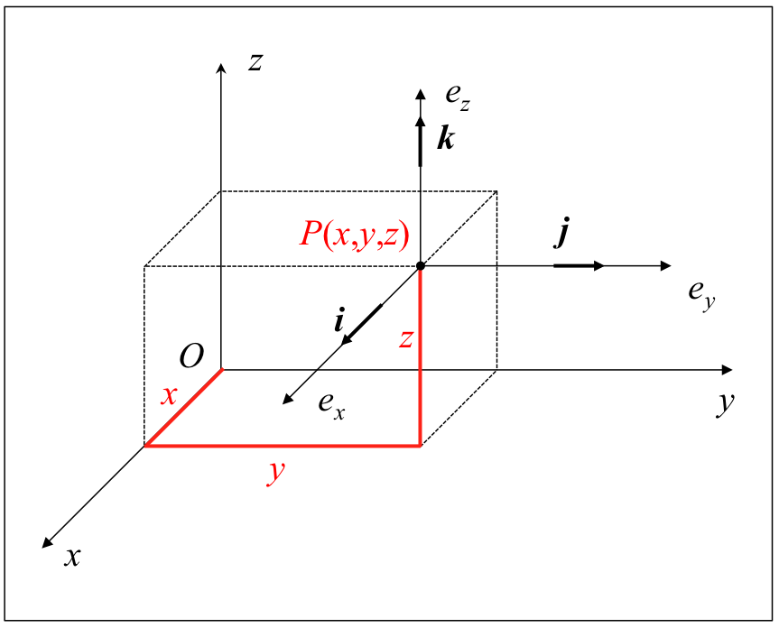 Erreferentzia-sistema kartesiarren ezaugarriak.